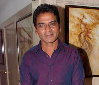 Daya Shankar Pandey at Saahil Chadha's wedding anniversary